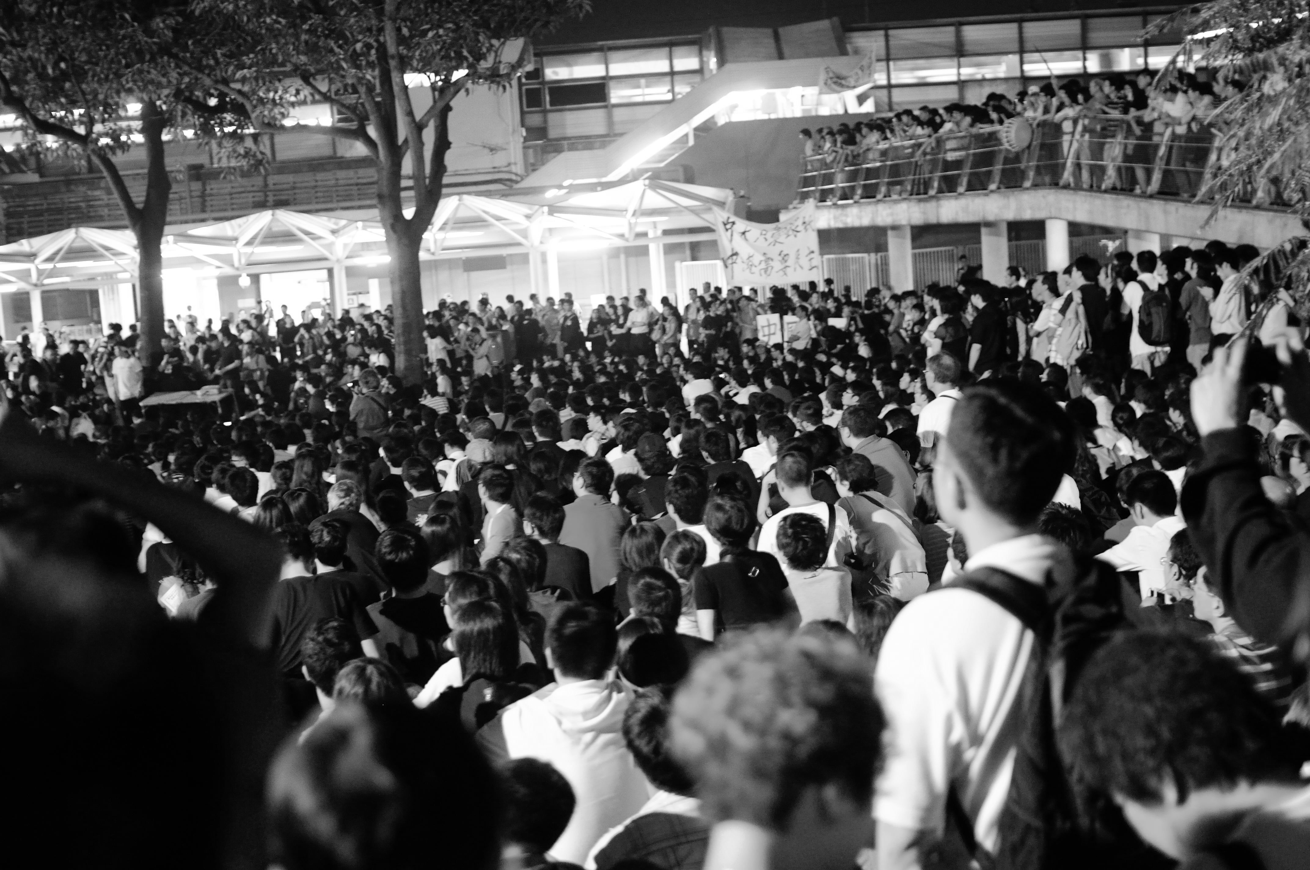 民主女神像 @ 中大 晚會 2010